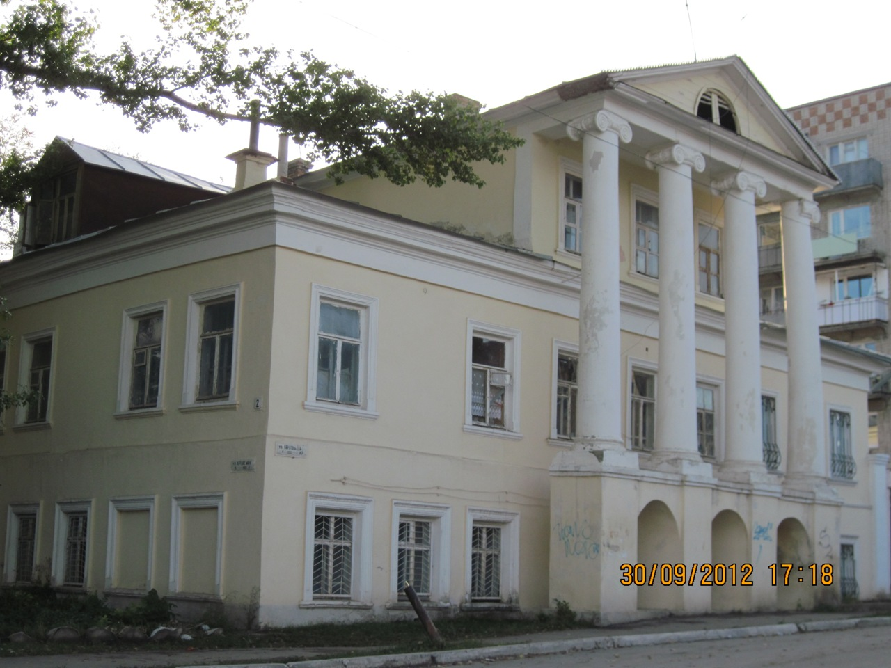 Г. Вольск Первомайская-2 Усадьба, детский приют-foto2